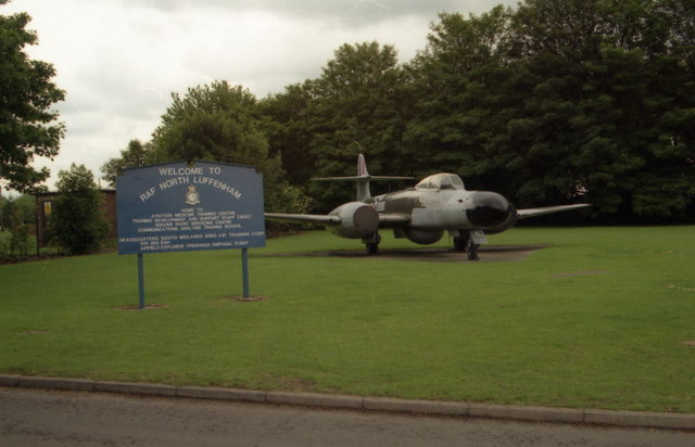 RAF North Luffenham